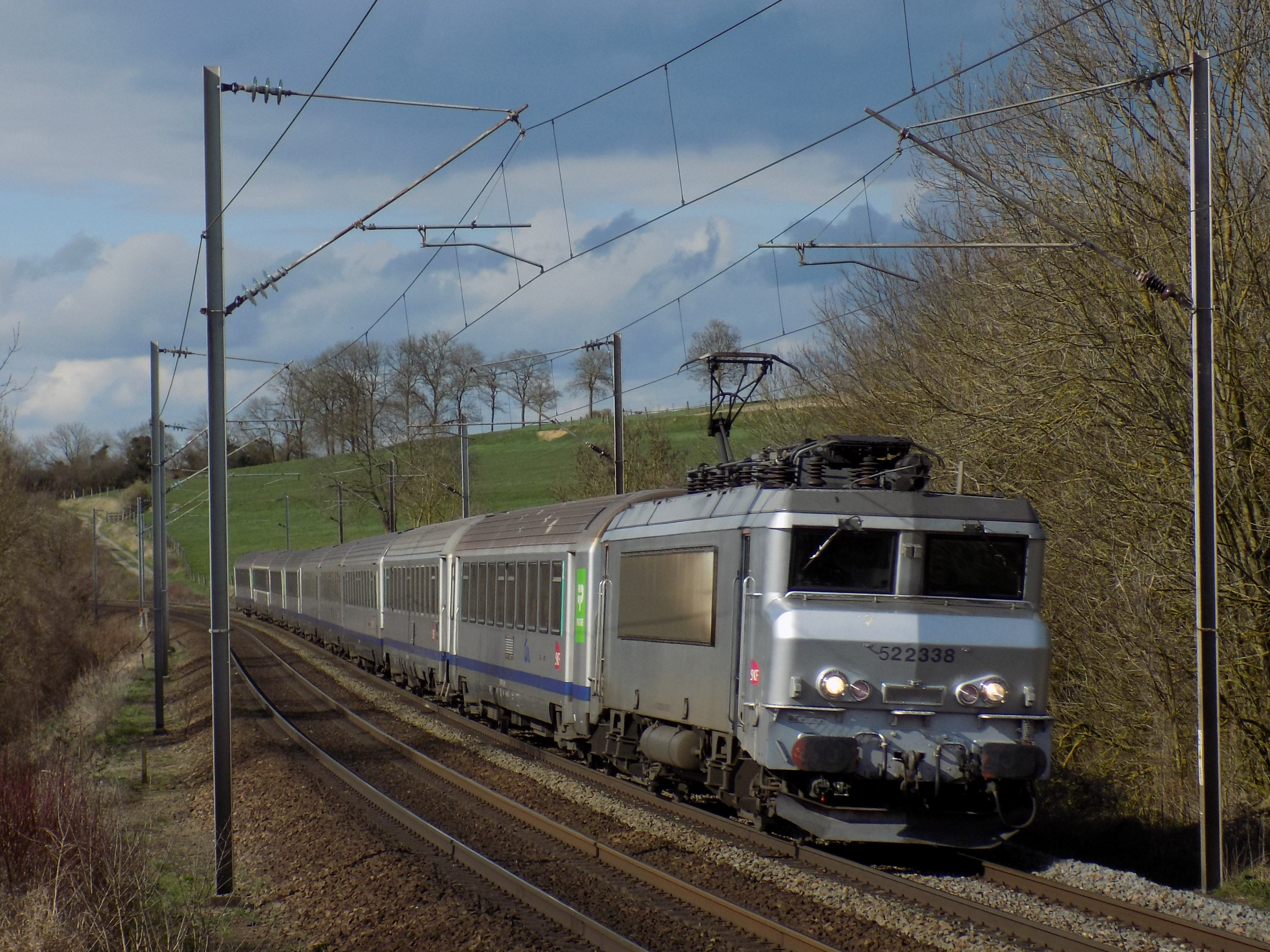 Intercités à destination de Paris-Nord